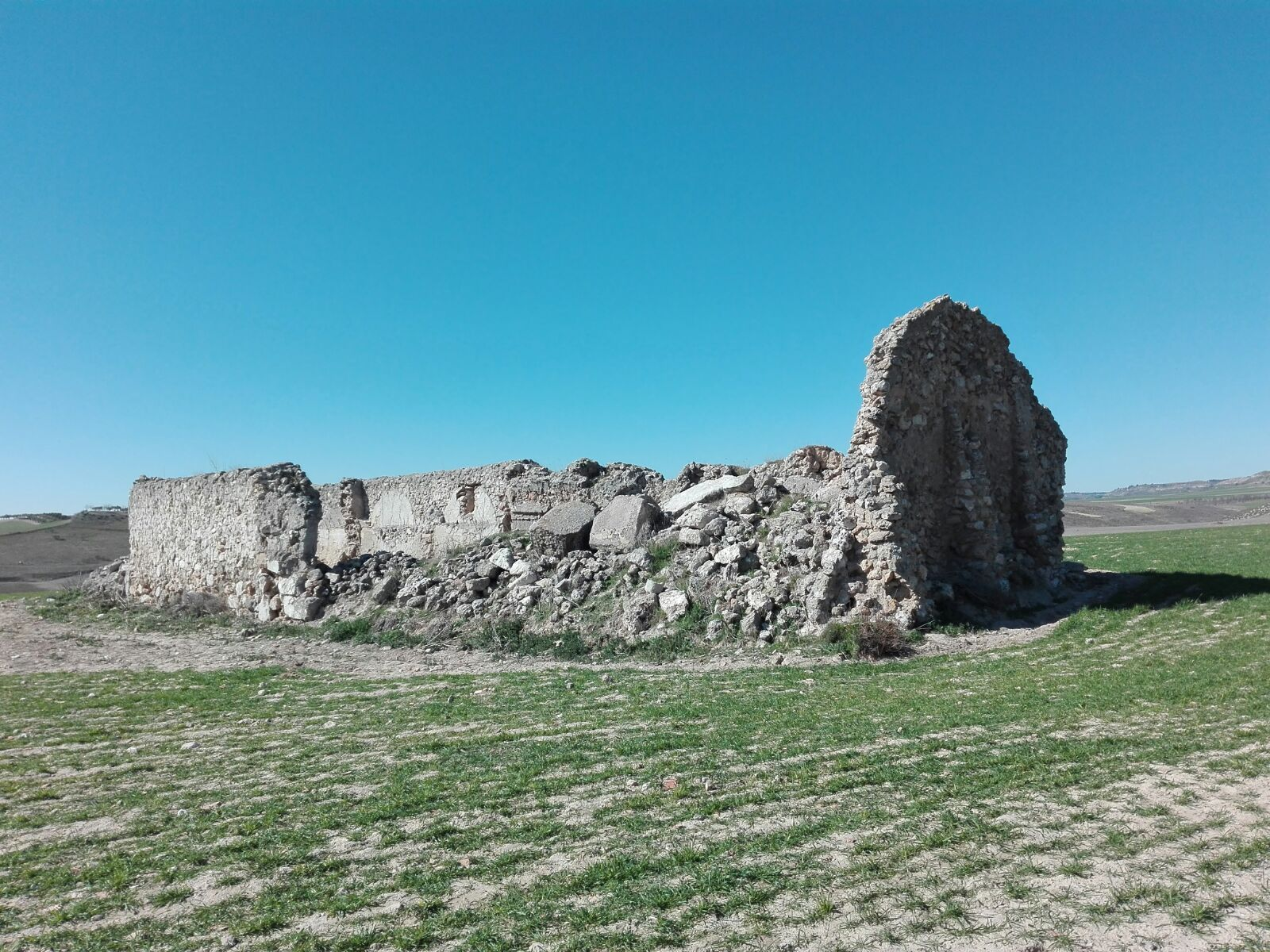 Foto tomada de las ruinas de la Ermita de la Virgen de la Muela, debajo de ellas esta la ciudad descubierta